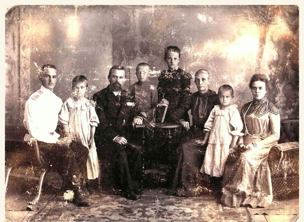 Семья Протопоповых в Муроме